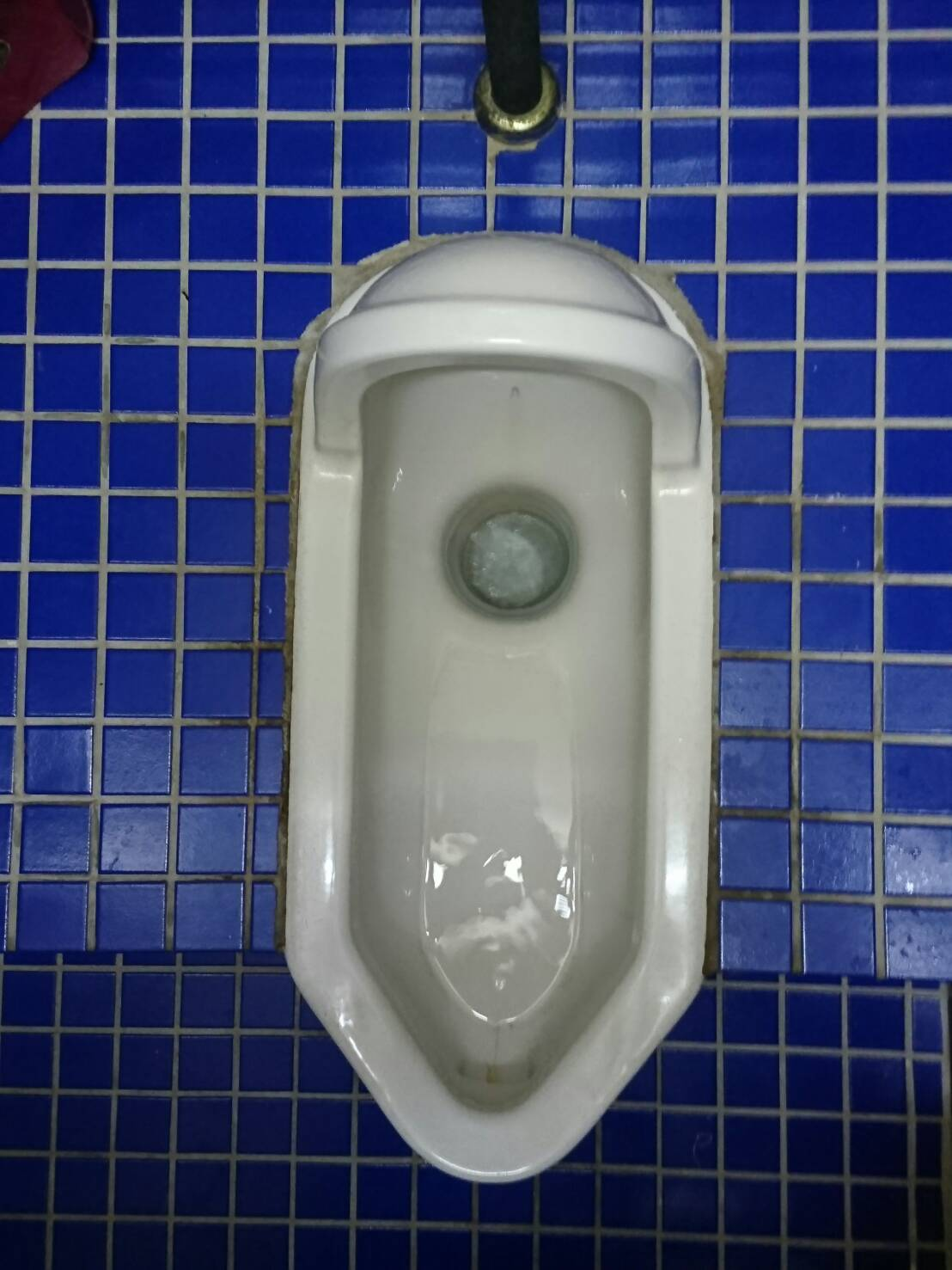 Toyotoki C63A